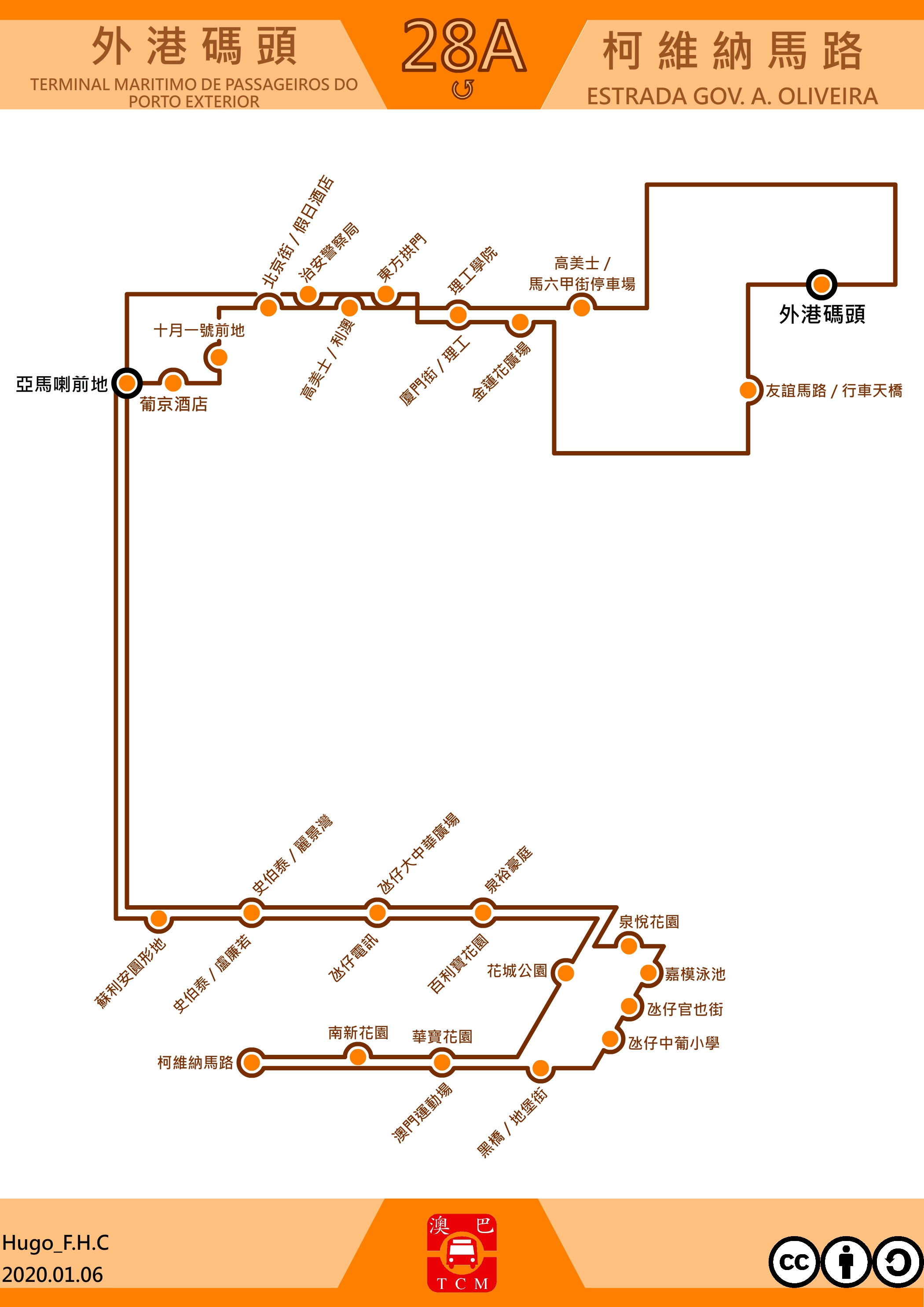 澳門巴士28A走線圖